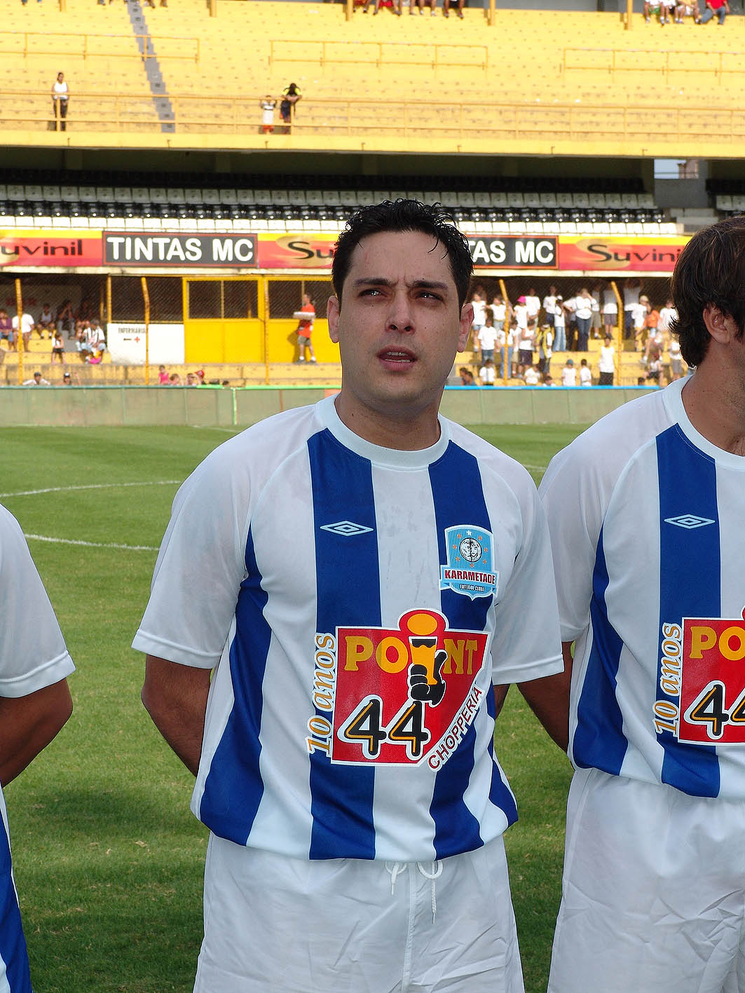 O cantor Vavá em jogo beneficente.